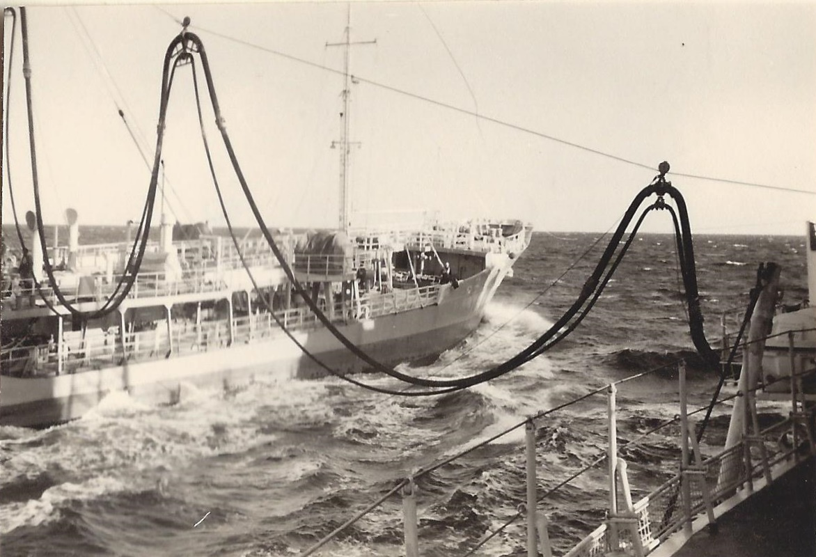 Highline-Manöver zur Kraftstoffversorgung in See vom Tanker Harz zum Zerstörer Hamburg.